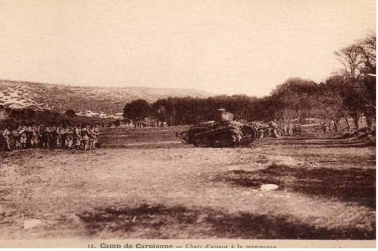 Char d'assaut à la manoeuvre sur le camp de Carpiagne